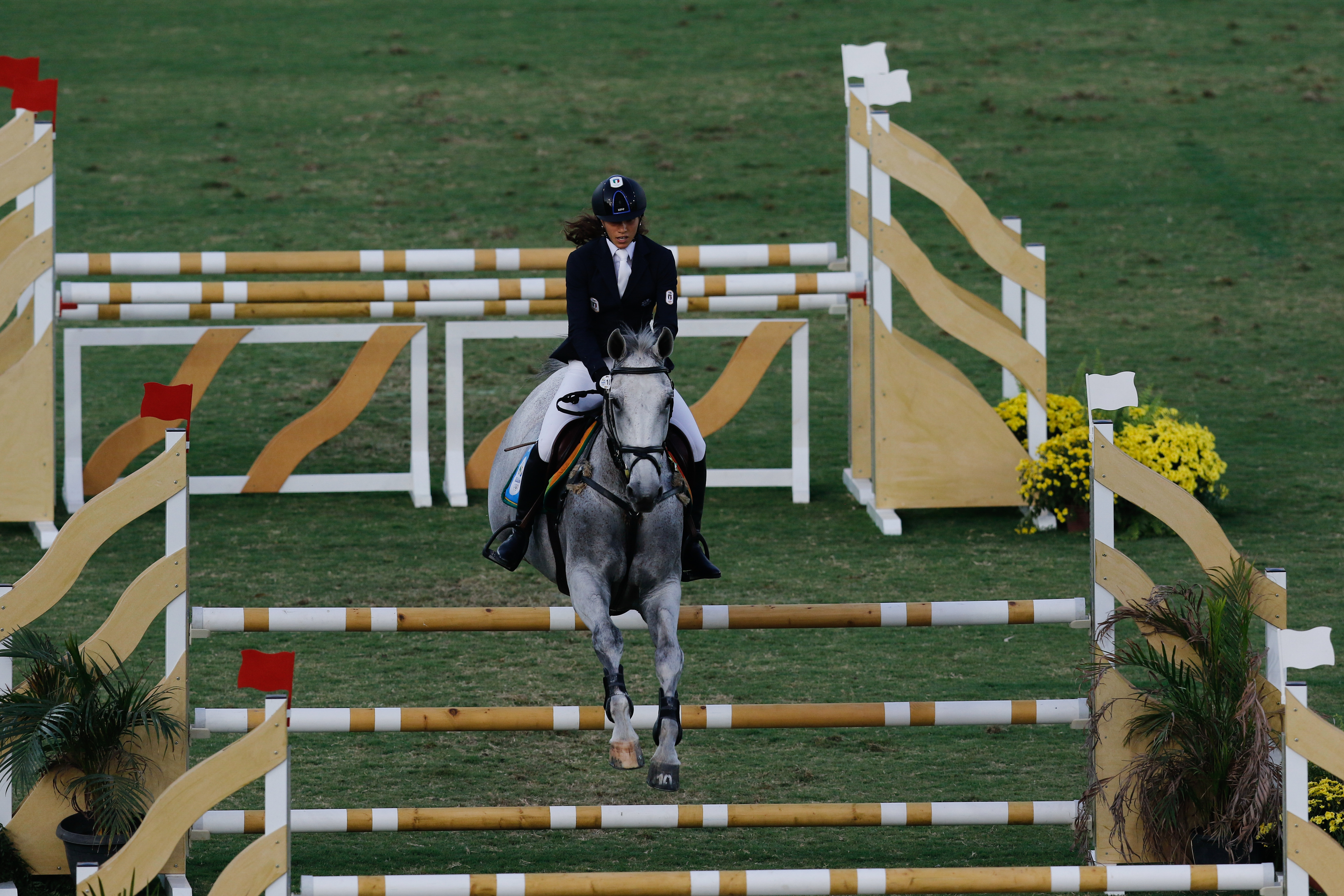 Rio de Janeiro - Italiana Alice Sotero na final do pentatlo moderno dos Jogos Olímpicos Rio 2016 no Estádio de Deodoro (Fernando Frazão/Agência Brasil)